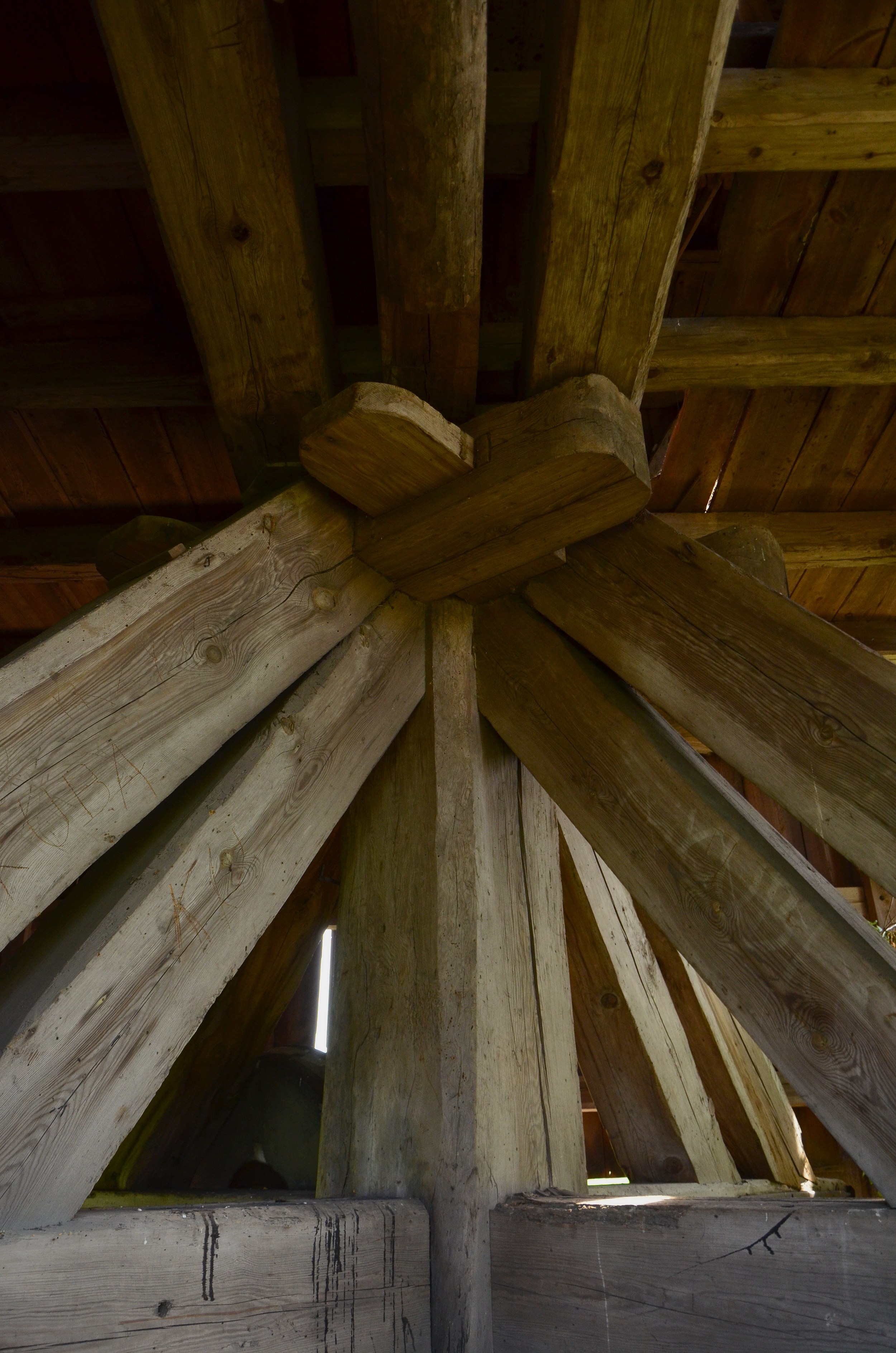 Kurkocin, wiatrak koźlak, XIX/XX